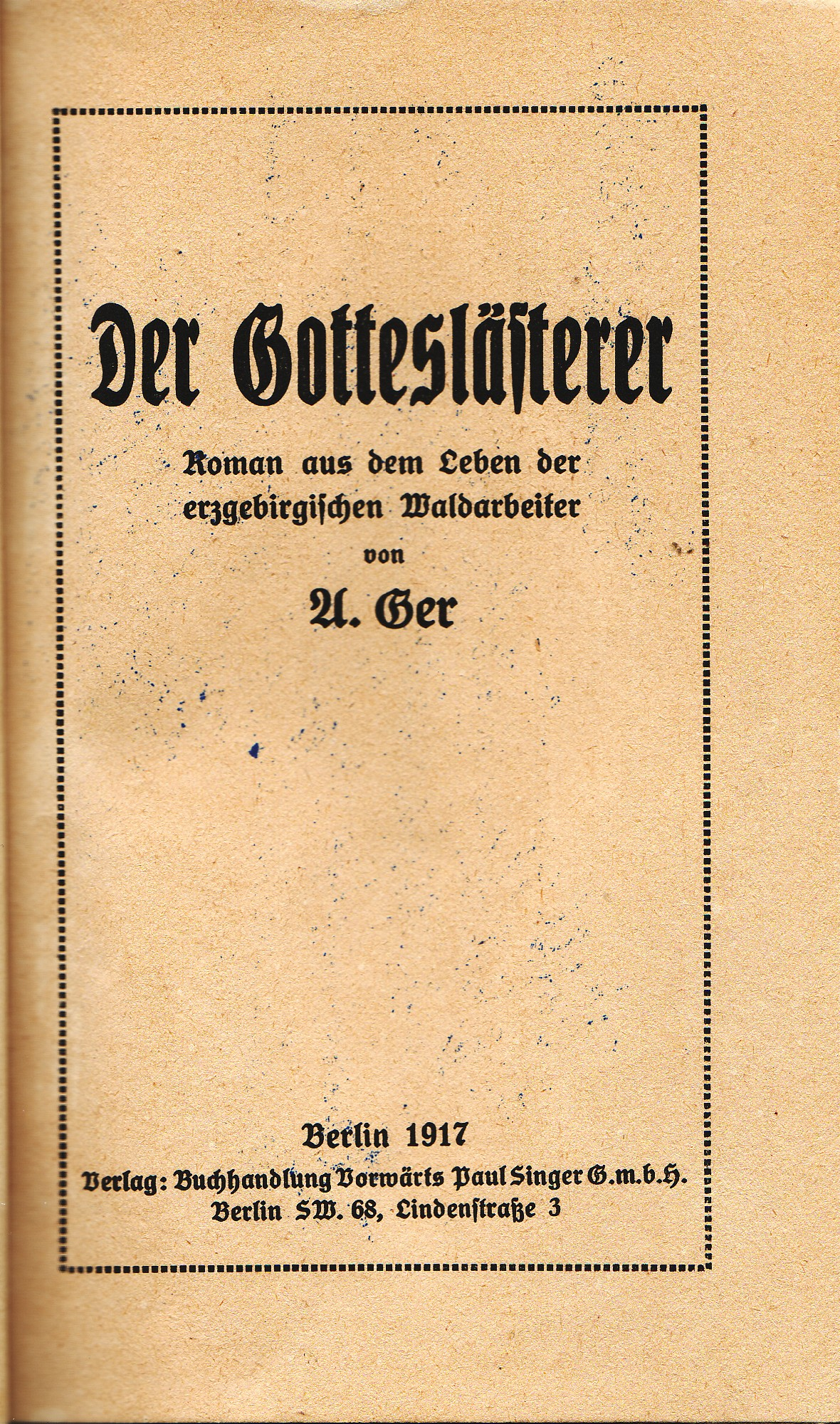 Unter dem Pseudonym A. Ger erschien in der Reihe „Vorwärts-Bibliothek“ der „Roman aus dem Leben der erzgebirgischen Waldarbeiter“ mit dem Titel „Der Gotteslästerer“. Verlegt wurde das Werk in „Verlag: Buchhandlung Vorwärts Paul Singer GmbH“ in Berlin. Alwin Gerisch war der erste Vorsitzende der SPD nach Aufhebung der Sozialistengesetze.